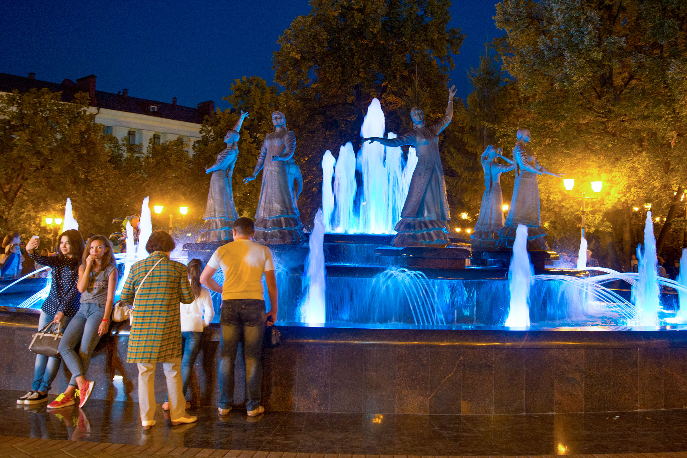 Уфа, фонтан "Ете кыз"